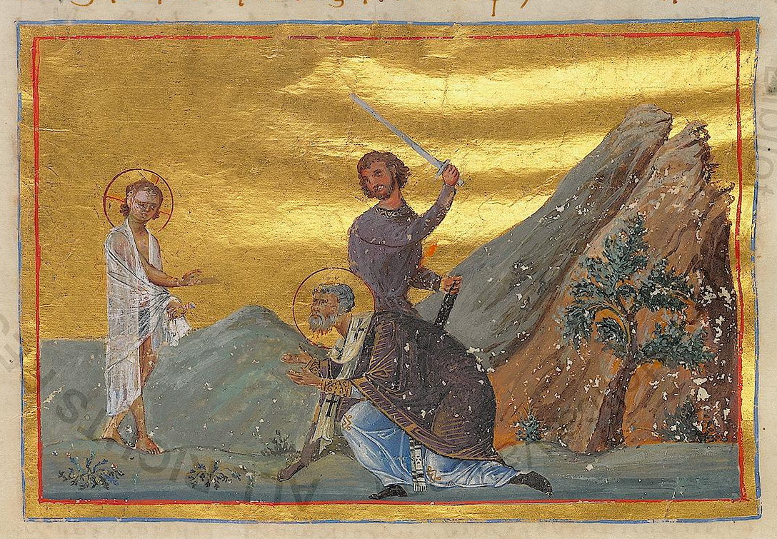 Константинополь. 985 г. Миниатюра Минология Василия II. Ватиканская библиотека. Рим.